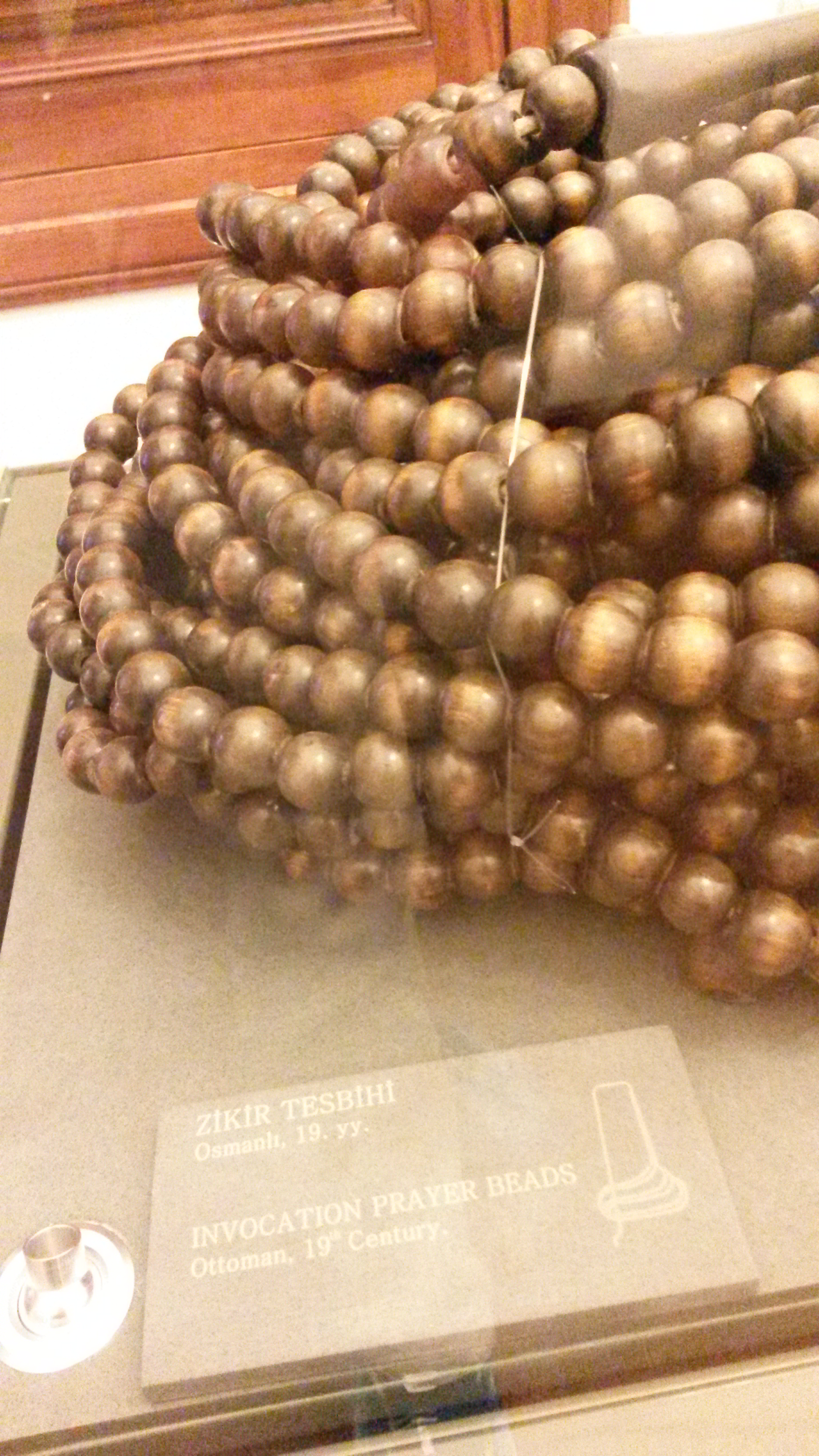 Zikir tesbihi.